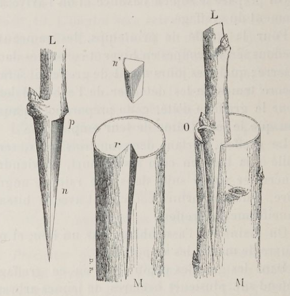 Dessin de greffe par incrustation